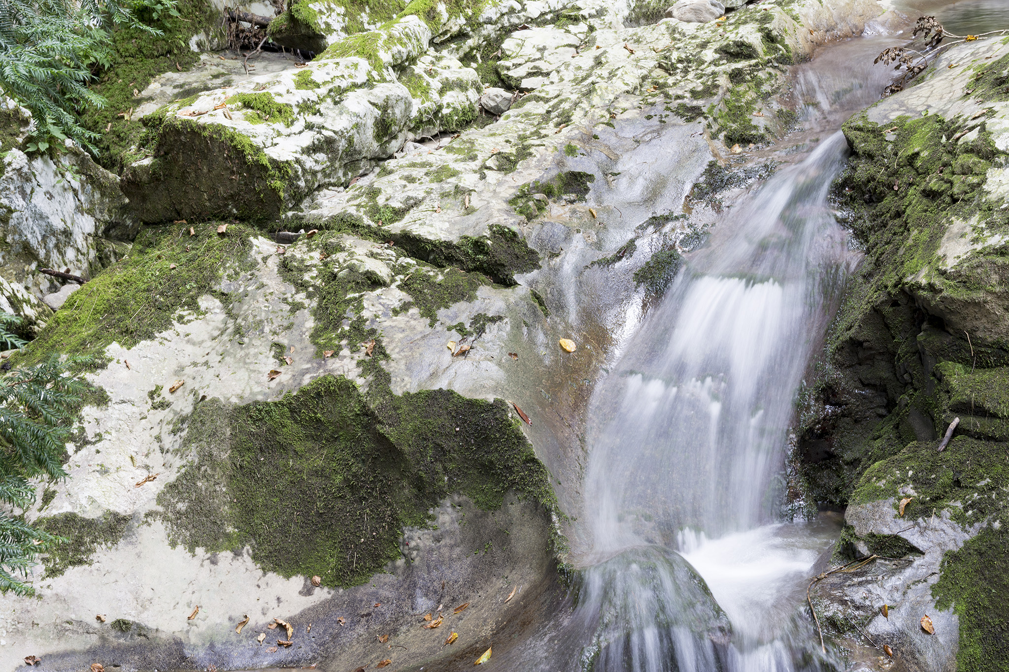 Una piccola cascata del torrente Cosa nel complesso delle Grotte di Pradis